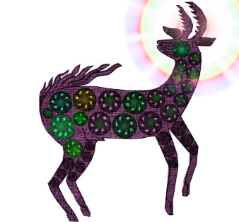 Representación del dios huichol Kauyumari, tomando de base el modelo de Santos Daniel Carrillo.